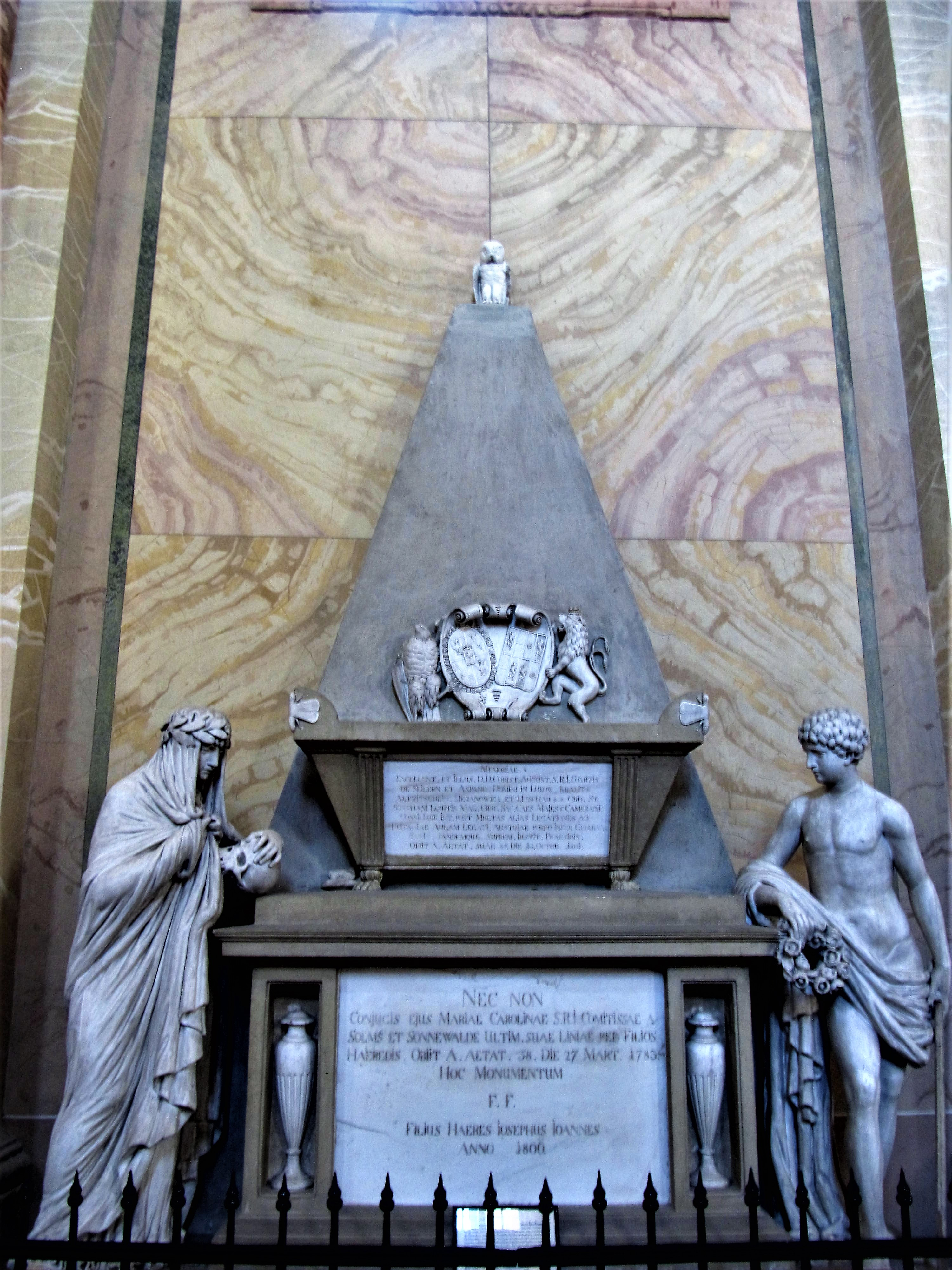 Hrobka hraběte Kristiana Seilern-Aspang (1717-1801) v kostele Narození Panny Marie ve Štípě